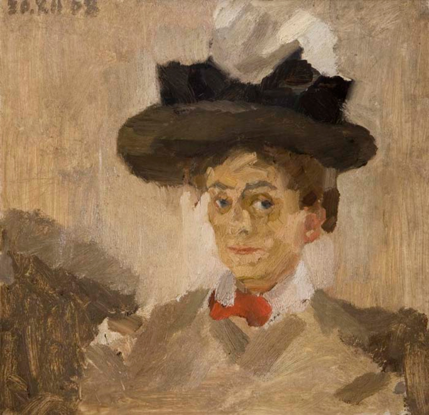 Elise Feldbauer- die Gattin des Künstlers